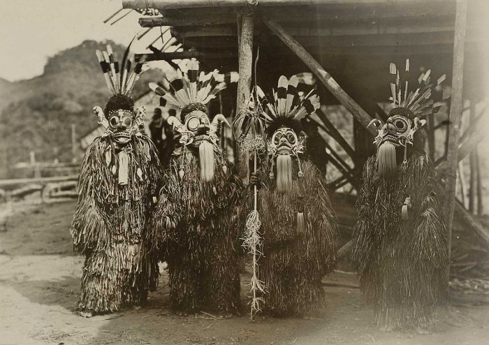 Foto. Deze foto is gemaakt tijdens de Commissiereis naar Centraal-Borneo van A.W. Nieuwenhuis. Maskerdans tijdens de zaaifeesten van de Bahau Dajaks, Boven-Mahakam